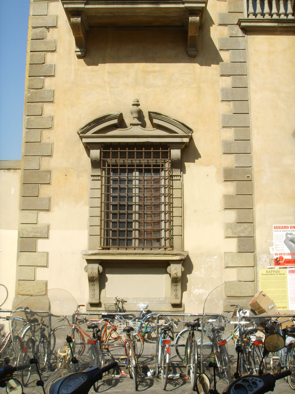 Palazzo_di_San_Clemente,_ facade in Florence